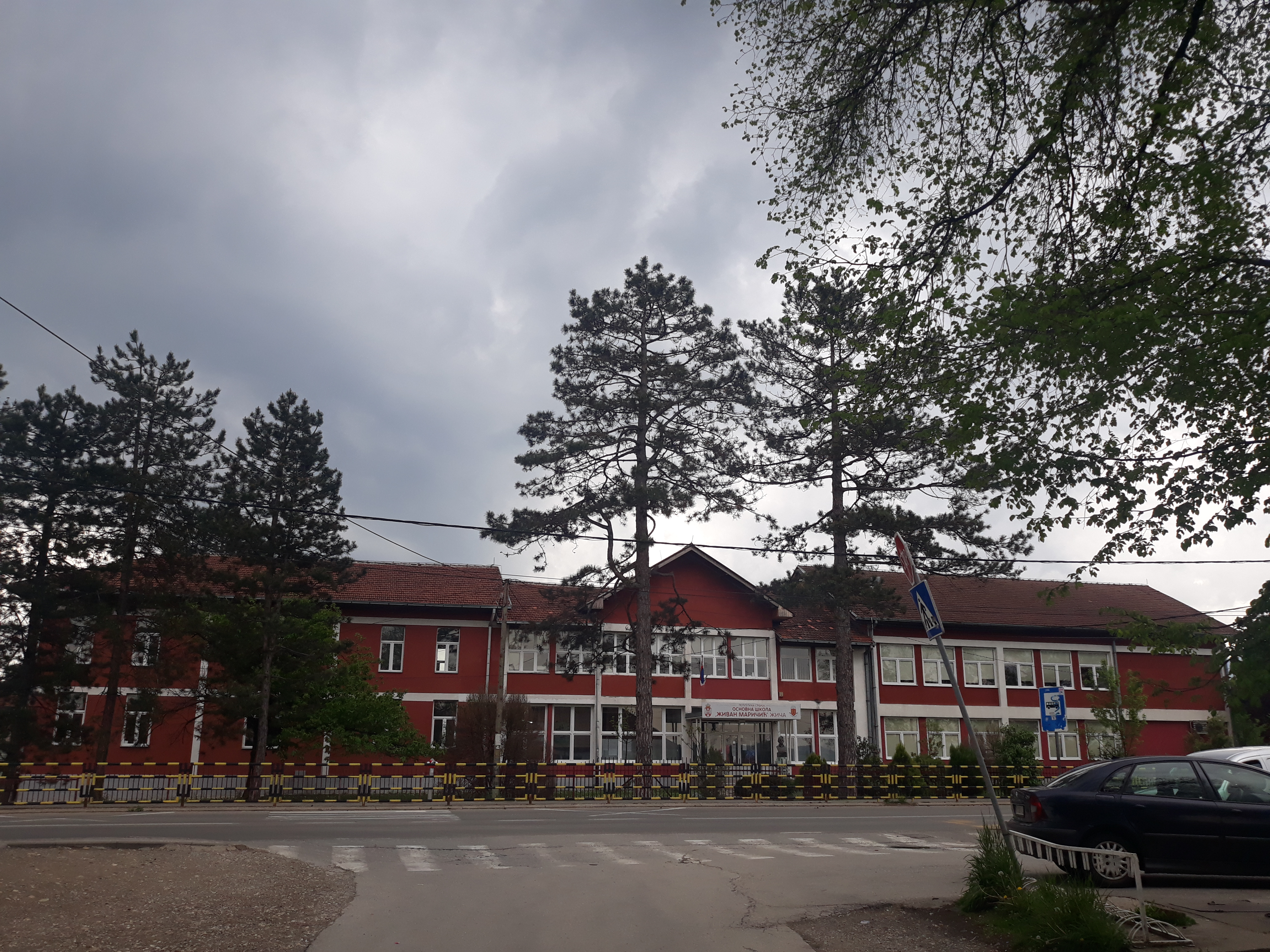 Основна школа „Живан Маричић“ у Жичи